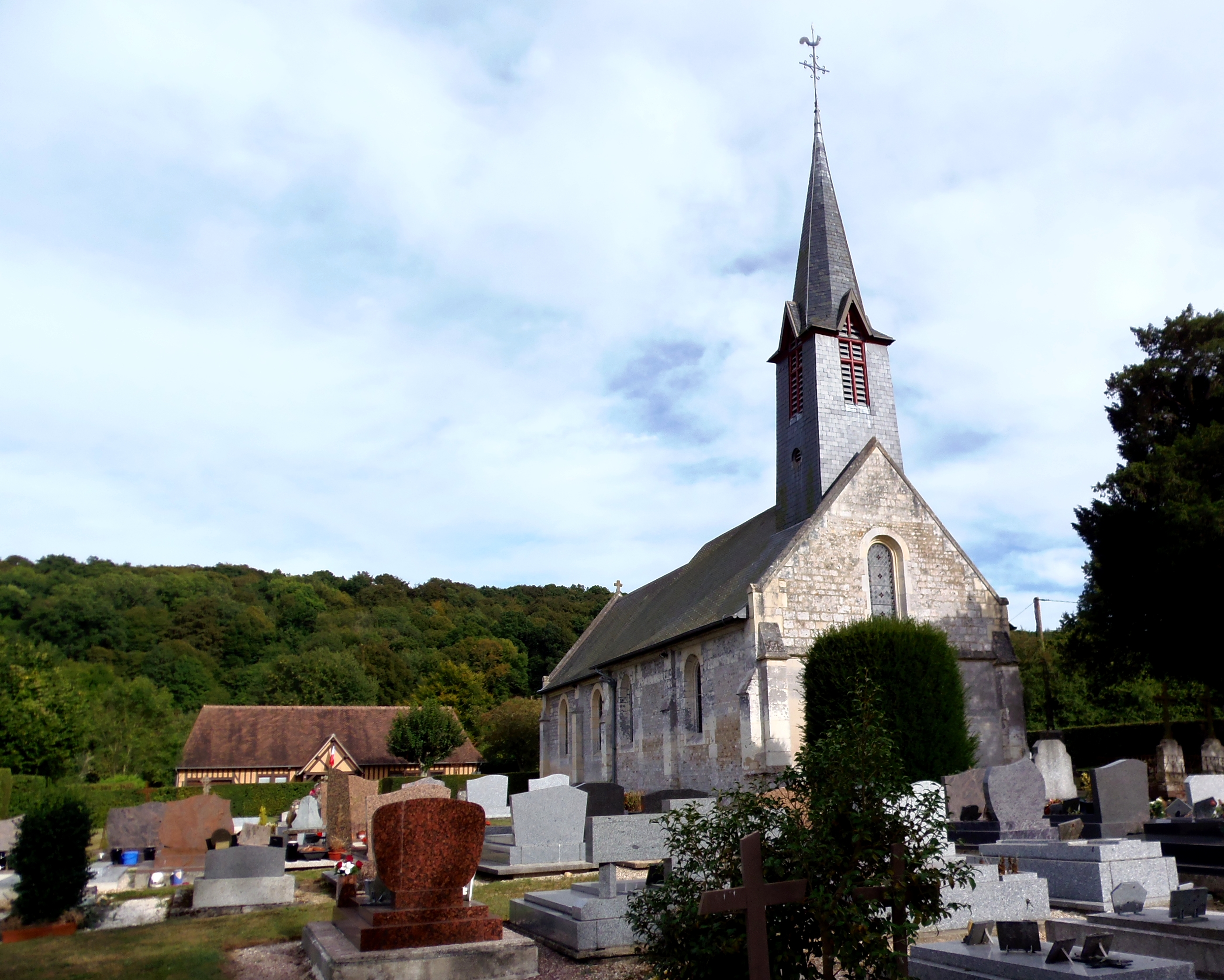 Fierville-les-Parcs (Normandie, France). L'église Saint-Gervais-et-Saint-Protais.